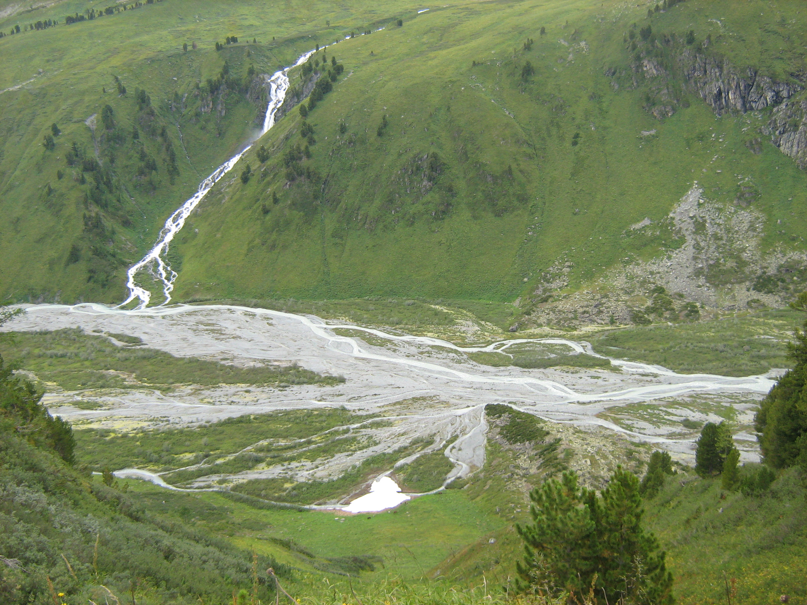 Водопад Рассыпной возле от истока Катуни